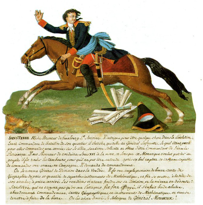 Fuite du général Santerre à la bataille de Vihiers